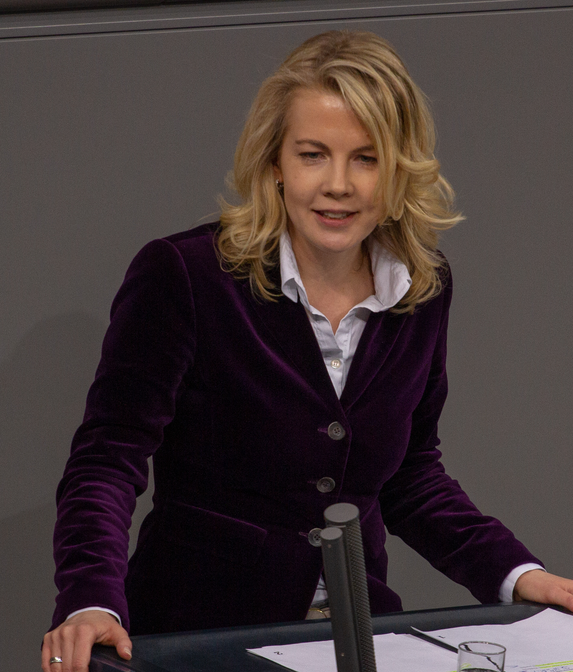 Linda Teuteberg, Mitglied des Deutschen Bundestages, während einer Plenarsitzung am 11. April 2019 in Berlin.